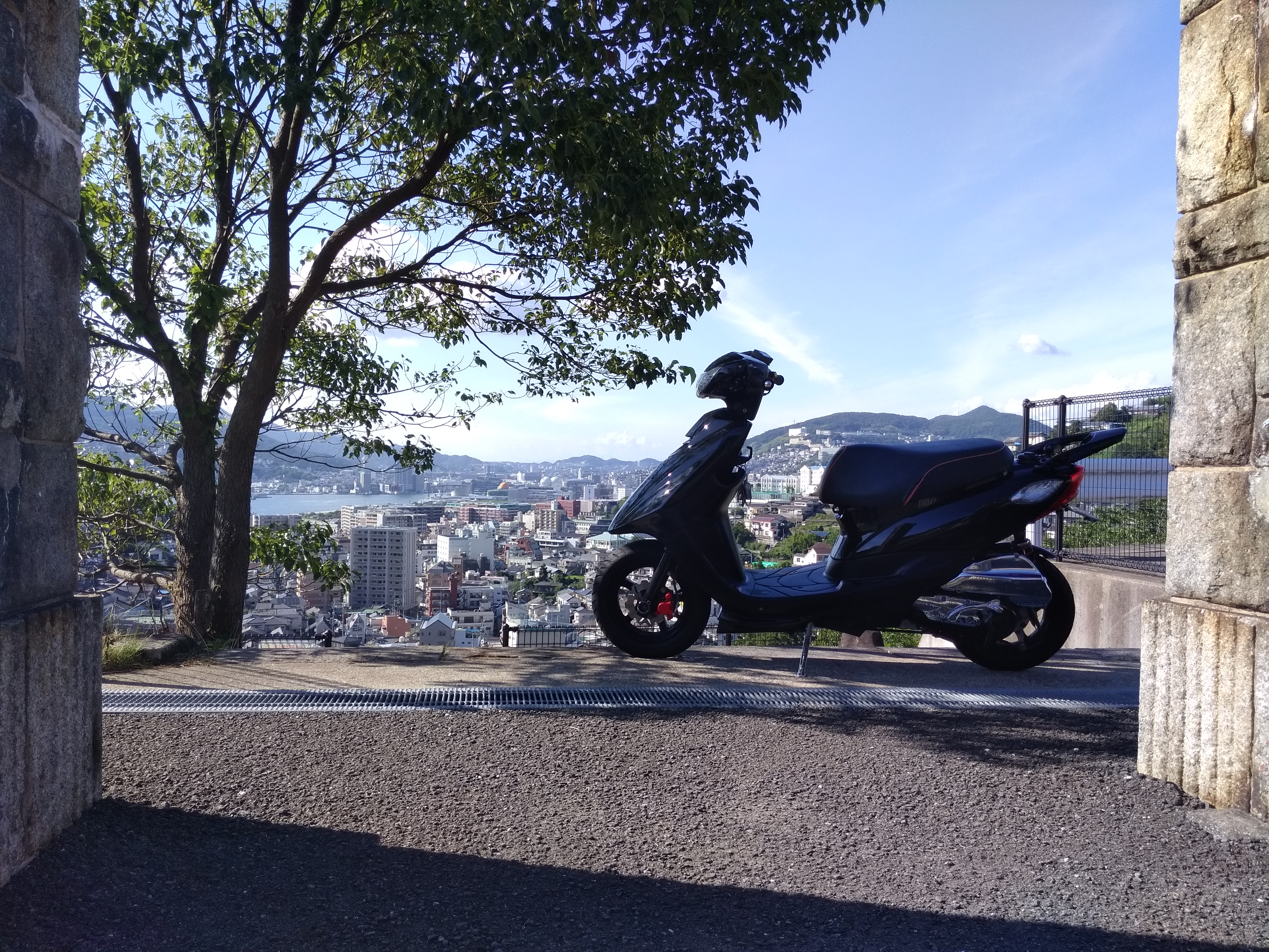 公園の入り口で撮った写真